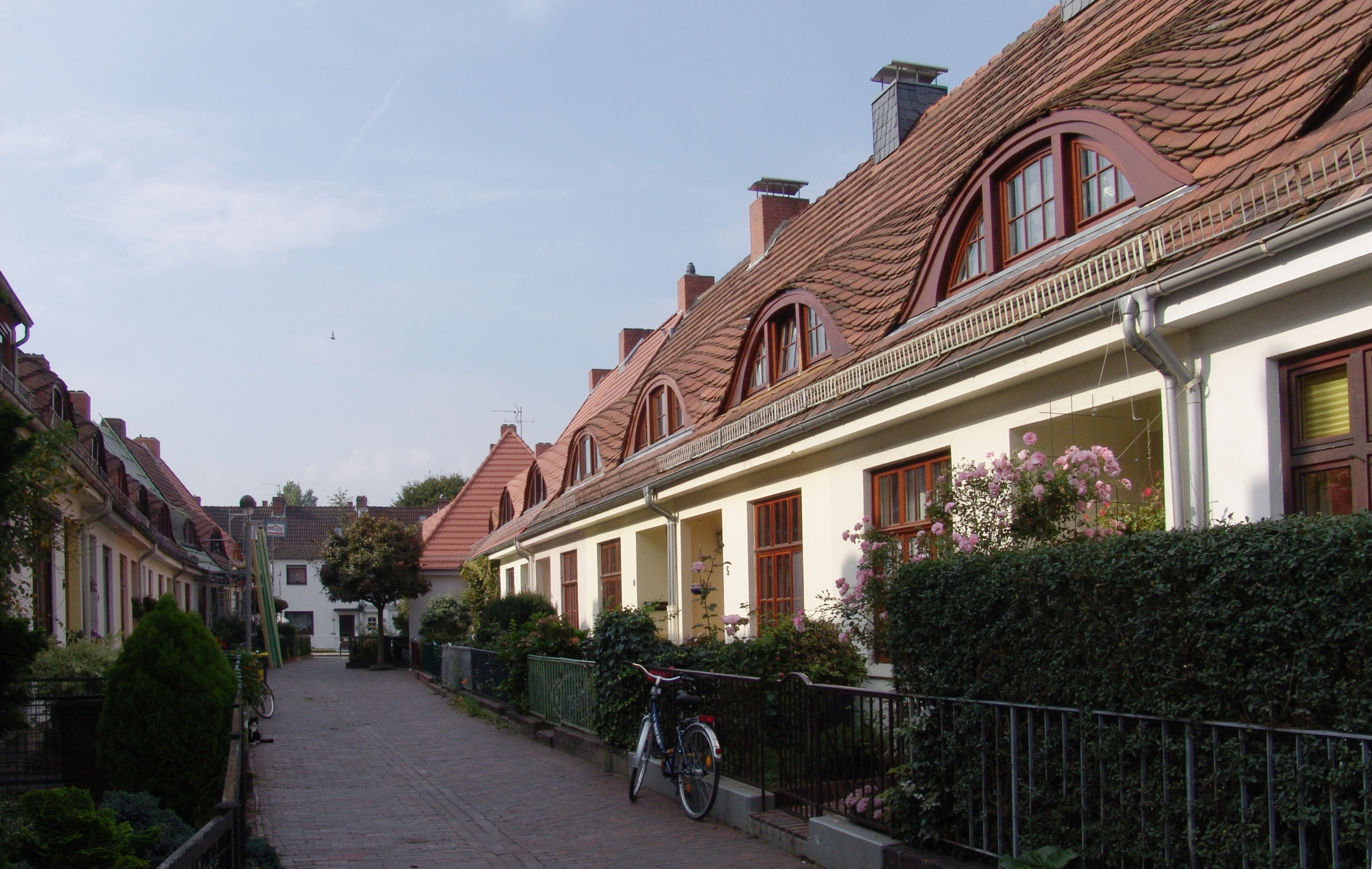 Gartengang „Feierabendweg“ in Bremen.Die Denkmalgruppe ist ein geschütztes Kulturdenkmal in der Freien Hansestadt Bremen, mit der Nr. 0364 beim Landesamt für Denkmalpflege registriert.